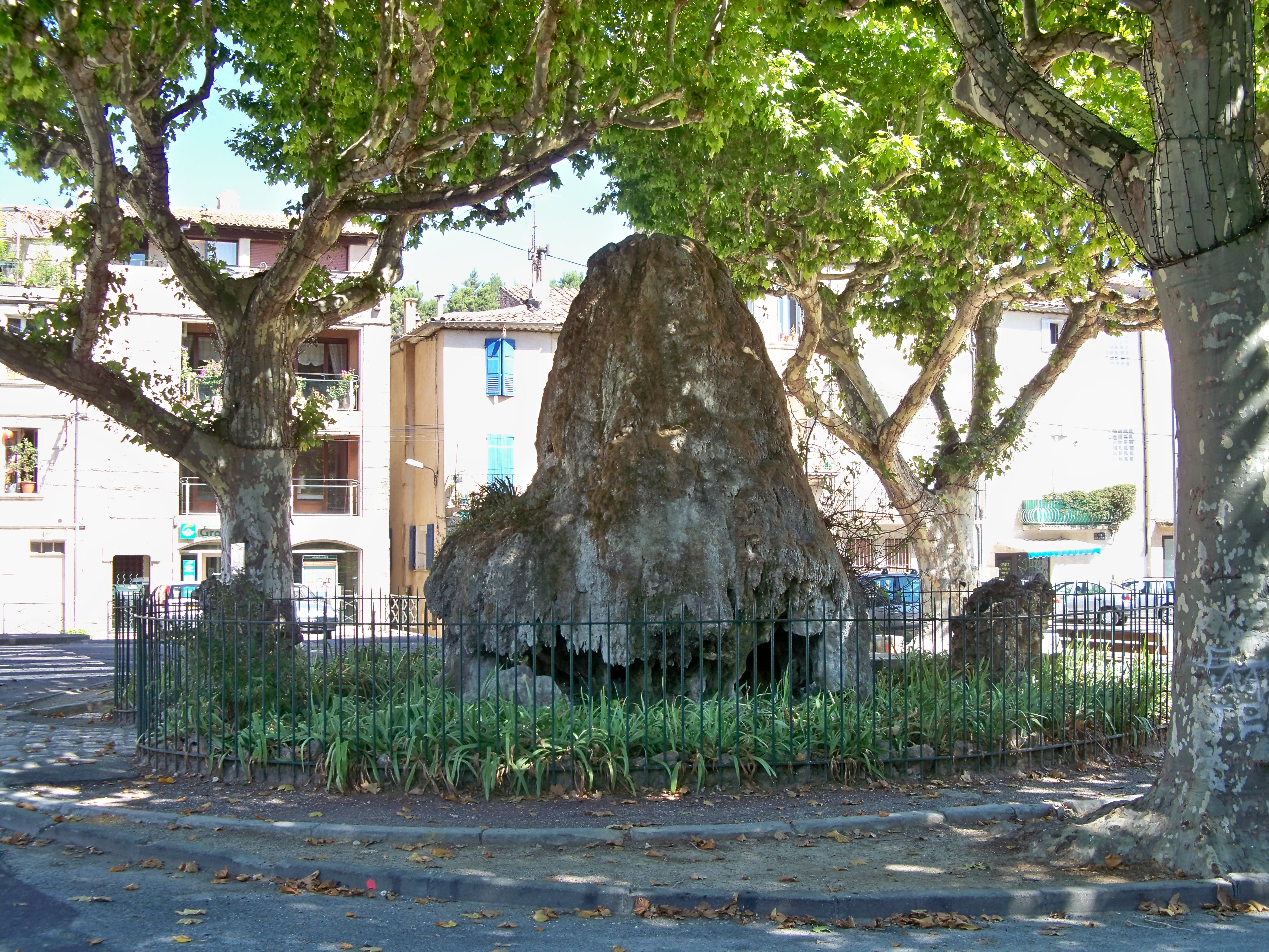 Fontaine à Apt, Vaucluse, France